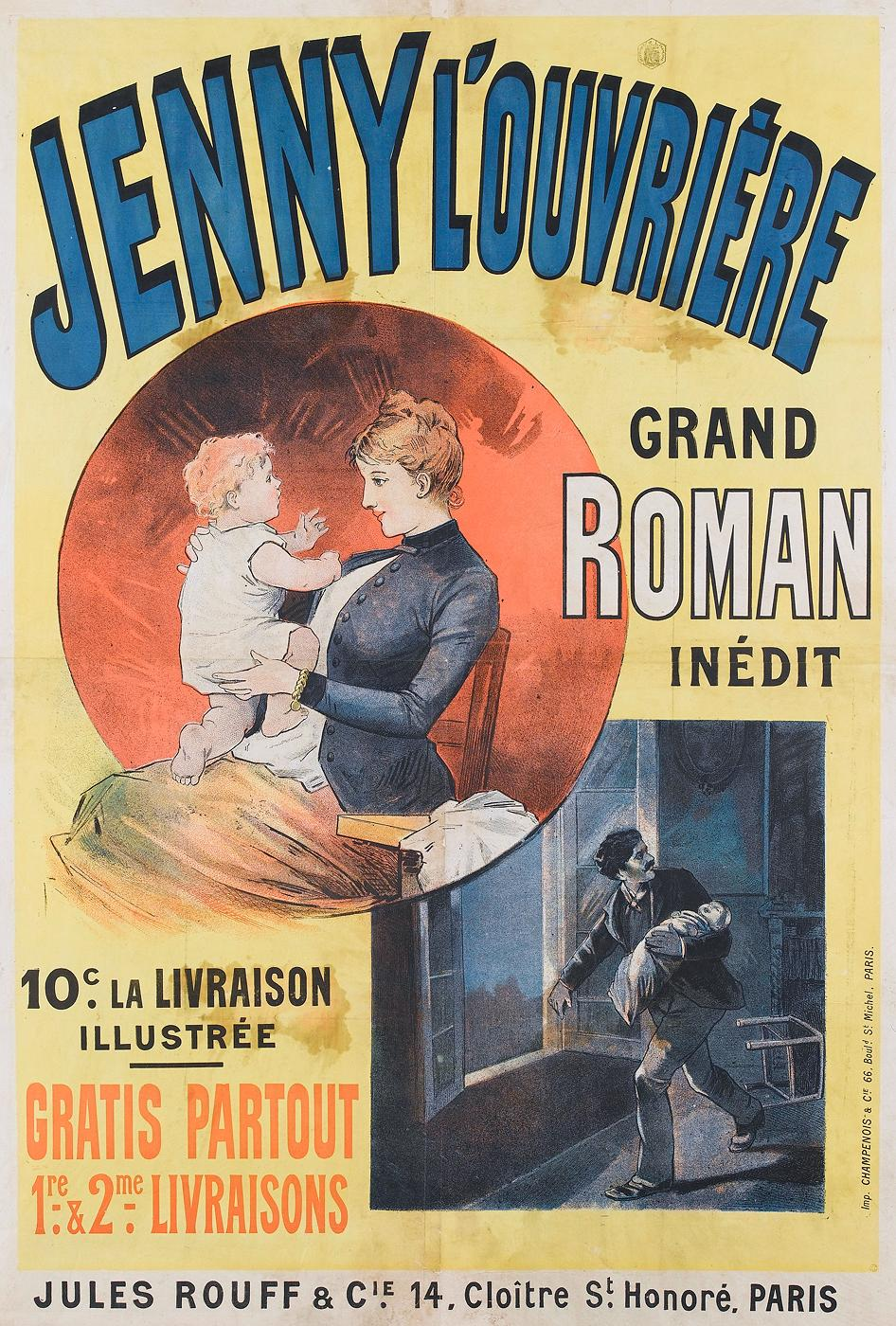 Jenny l’ouvrière, affiche publicitaire datant de 1890-1891, imprimée par Champenois & Cie, pour le roman populaire de Jules Cardoze.